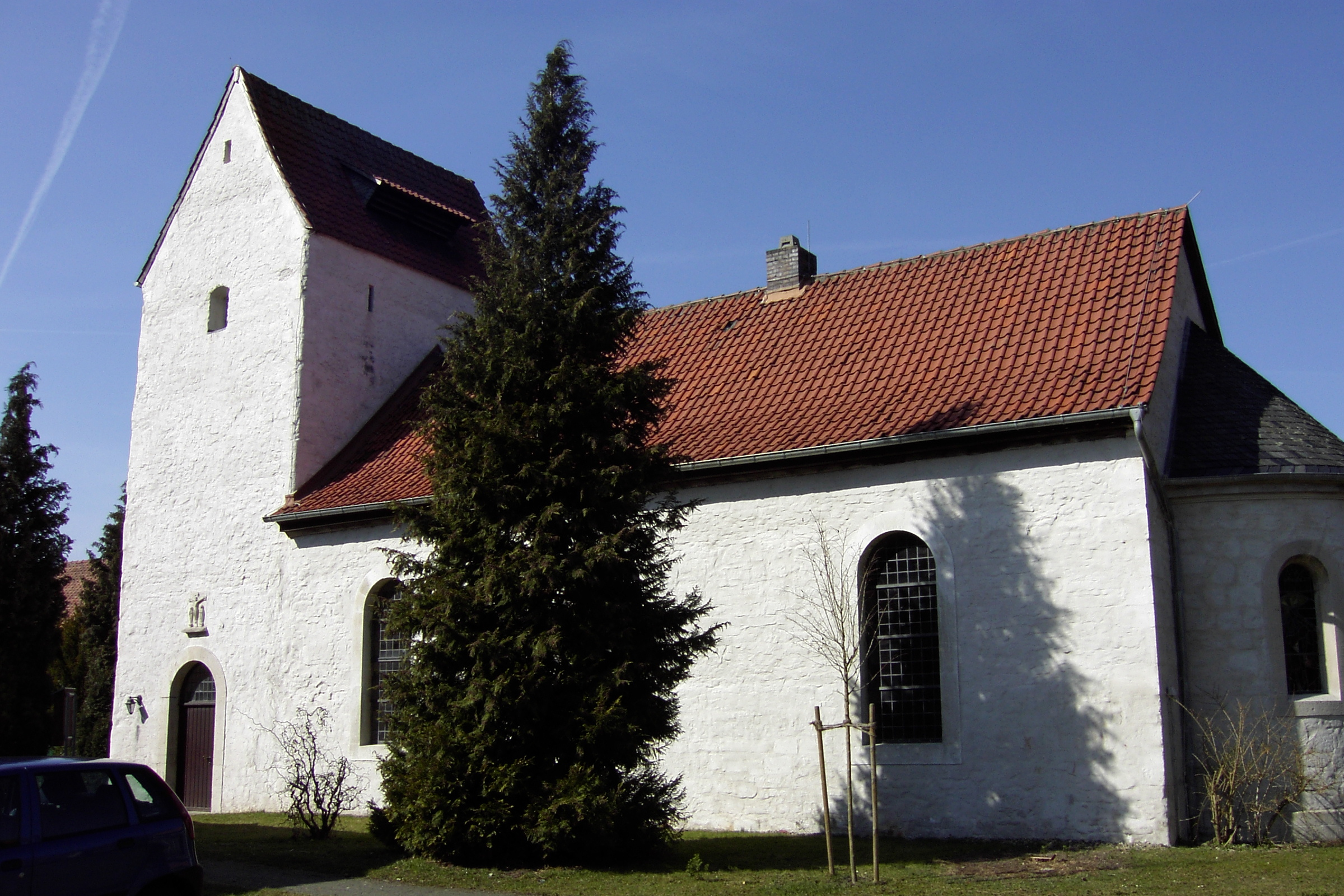 Kirche in Erkerode, Deutschland